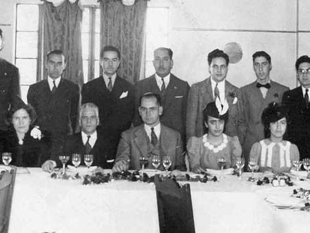 Alejandro Prieto Ll. y Agustín Loera y Chávez en un evento soial de los alumnos de la EBC.